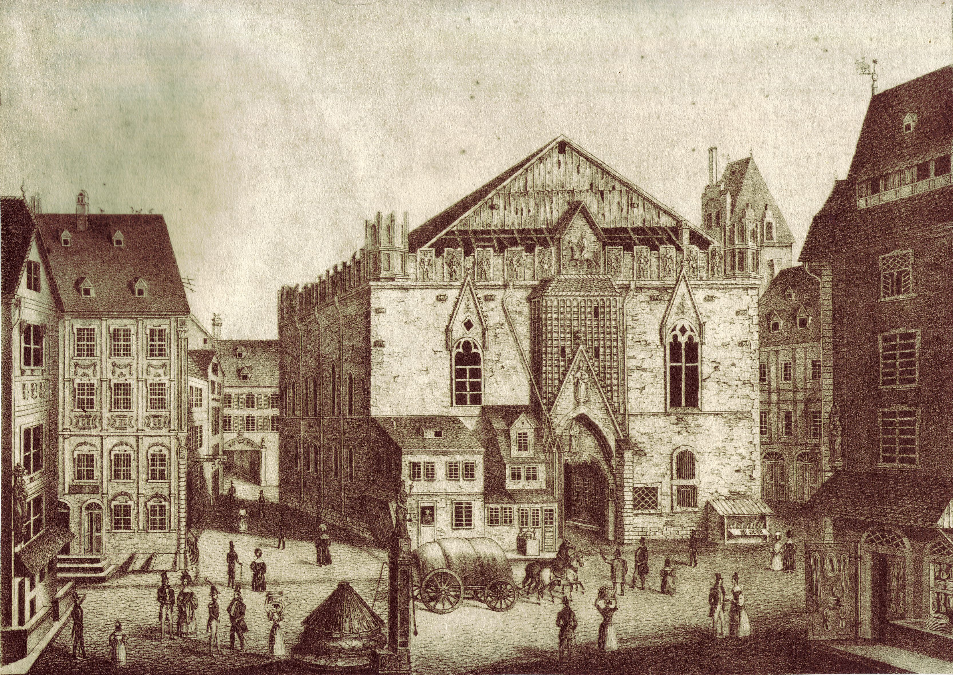 [Originalbeschreibung] Erbaut zur Zeit des Erzbischof und Kurfürsten von Aichpalt, im Jahr 1314 bis 1317 unter Kaiser Ludwig von Bayern. Abgerissen im Jahr 1812 und 1813.